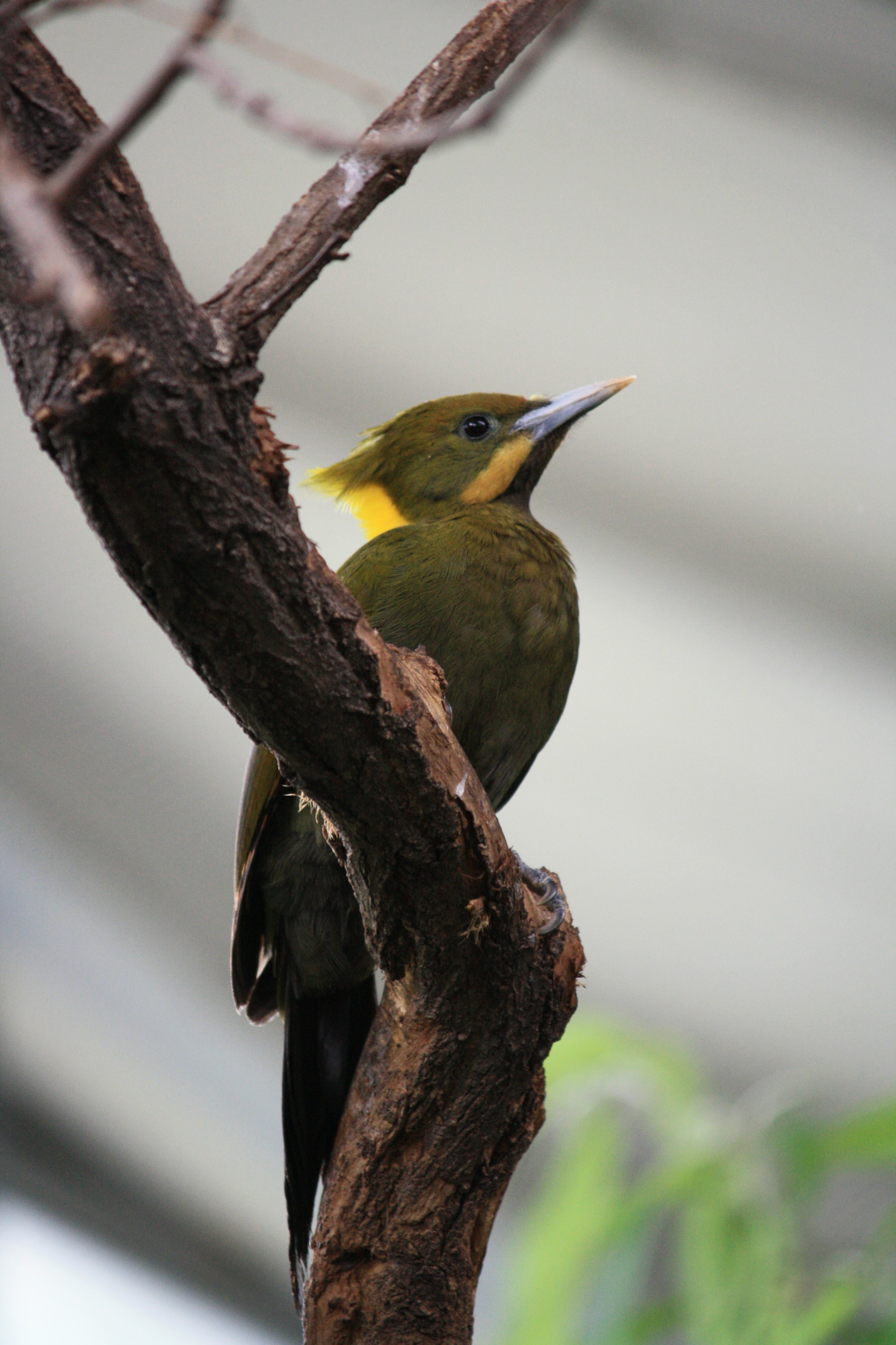 Žluna větší v Pražské Zoo